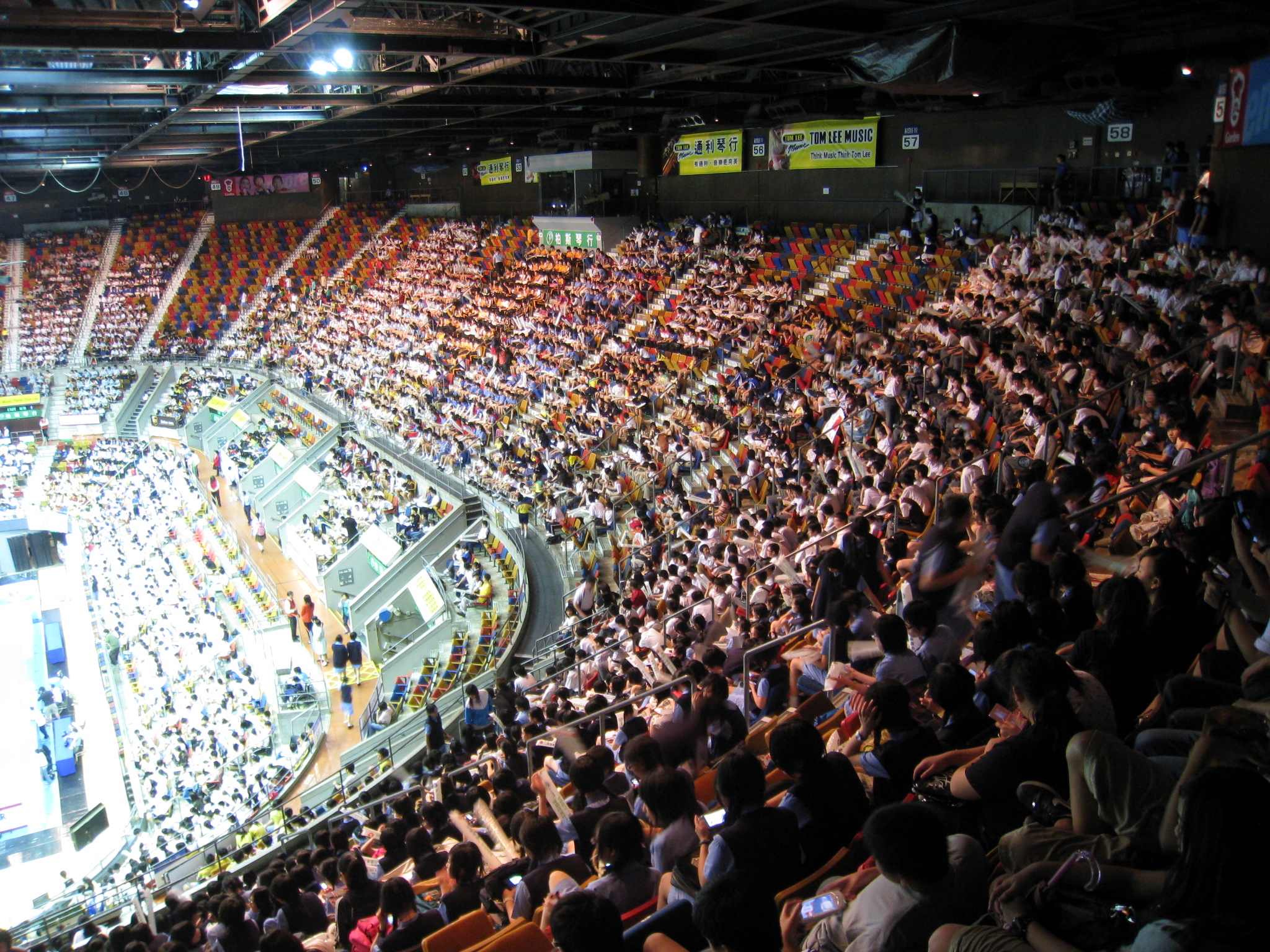 Hong Kong Coliseum Seats 香港體育館